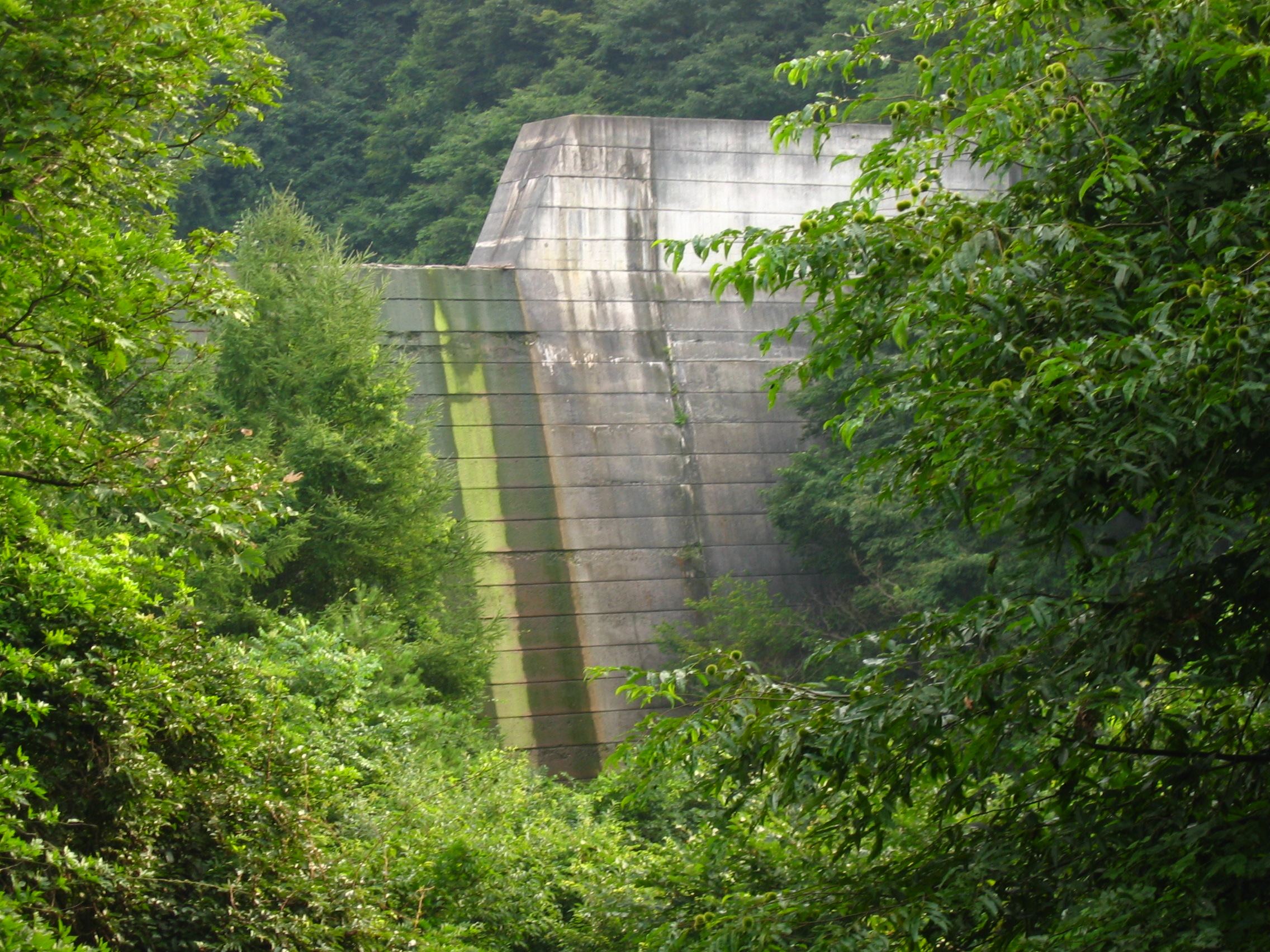 Amekawa Dam (雨川ダム) is a dam in Nagano, Japan.